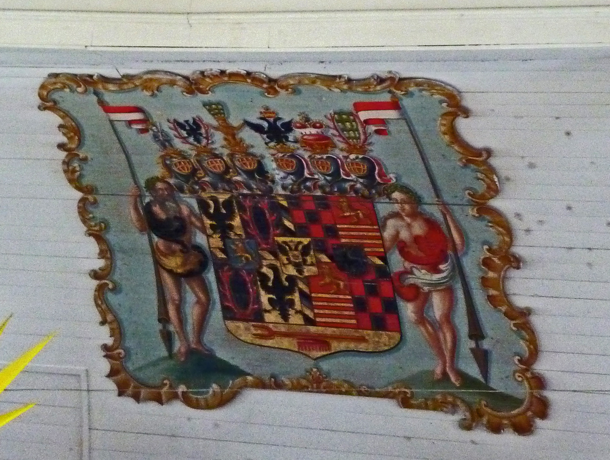 Gesamtwappen des Fürstentums Schwarzburg-Rudolstadt in der Hoffnungskirche Oberweißbach/Thür. Wald Sechsfach behelmtes Gesamtwappen mit dem Doppeladler im Herzschild, in den vier Außenfeldern das alte Schwarzburger Wappenschild mit dem Löwen, die Sondershäuser Hirschstangen und der Arnstädter Adler, getrennt durch das sogenannte Viergrafenkreuz, flankiert vom Wilden Mann und Wilder Frau als Schildhalter. Im oberen Teil des Wappens nochmals der Arnstädter Adler, der Schwarzburger Löwe, der Reichsadler (Doppeladler), die Fürstenkrone (ab 1710, als Zeichen der gefürsteten Grafen) und die Sondershäuser Hirschstangen. Im unteren Teil des Wappens die Schlackengabel der Schwarzburger und der Kamm als ritterliche Helmzier.